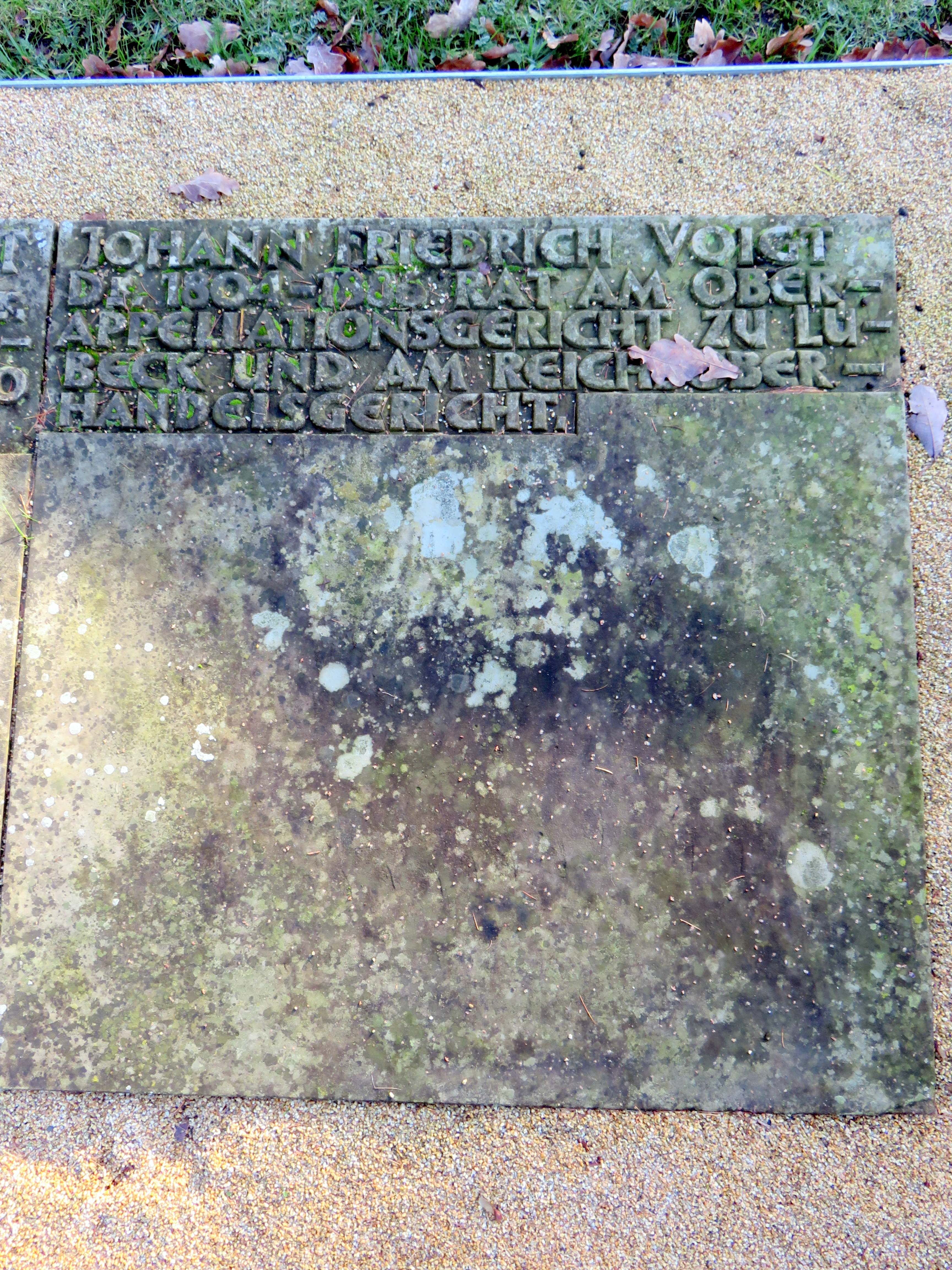 Doppelsammelgrab Obergericht im Bereich des Althamburgischen Gedächtnisfriedhofs auf dem Hamburger Friedhof Ohlsdorf zu Ehren von unter anderem Hermann Baumeister, Johann Carl Knauth, Johann Friedrich Voigt.